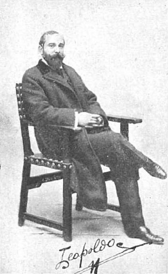 Leopoldo Romeo. Fotografía de Christian Franzen.